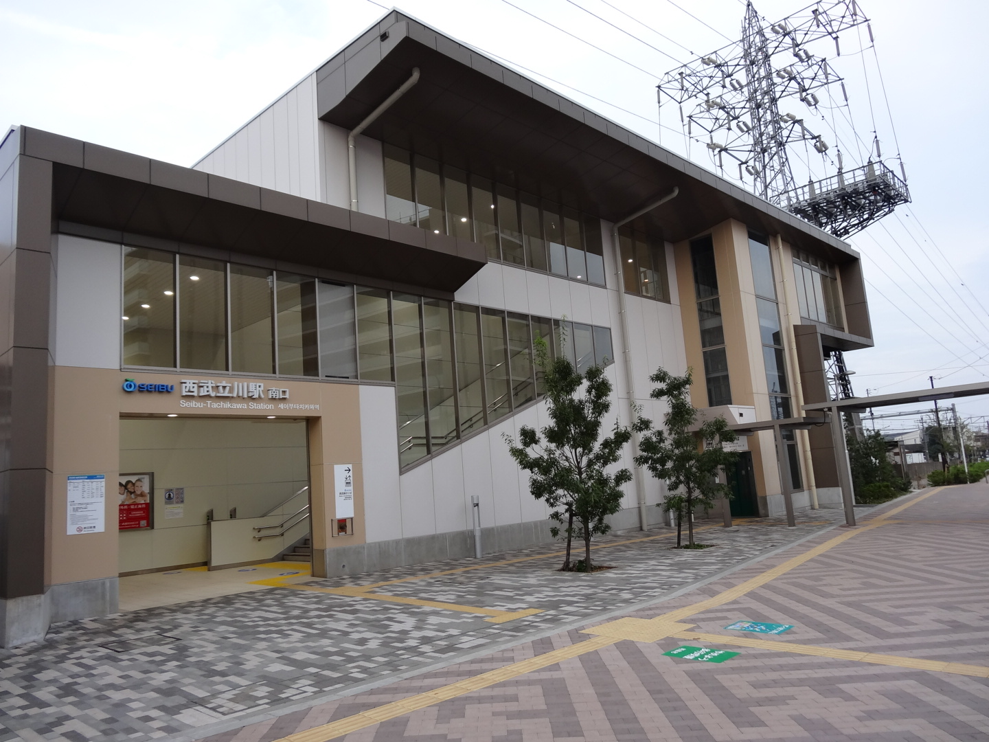 西武立川駅南口（2013/11/02撮影）